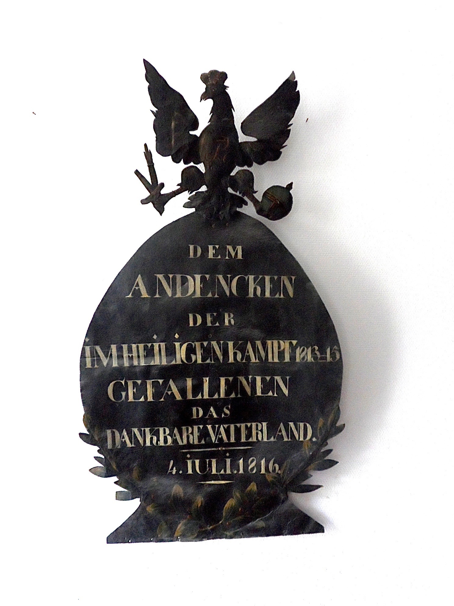 Evangelische Stadtkirche Monschau: Gedenktafel für die Gefallenen der Befreiungskriege 1813-1815